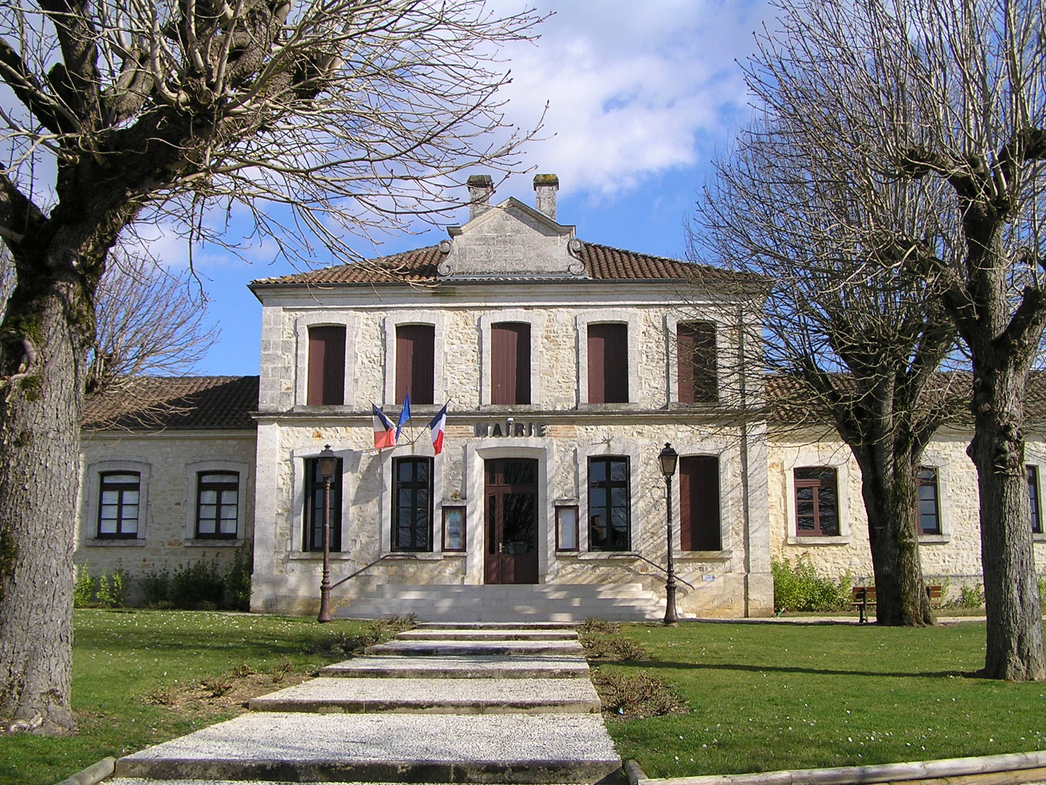 mairie de Pranzac